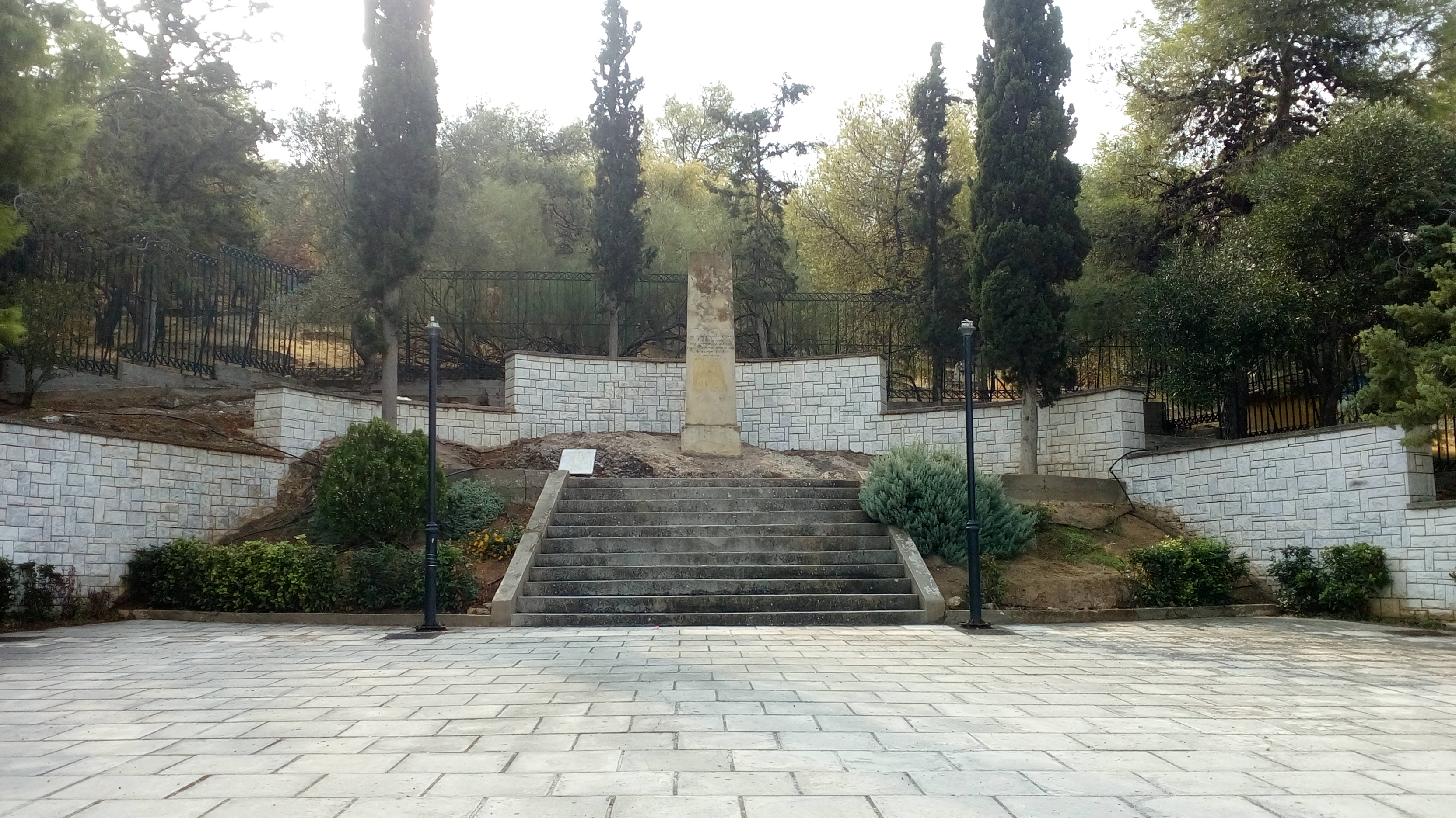 Το ηρώο των πεσόντων του Υμηττού